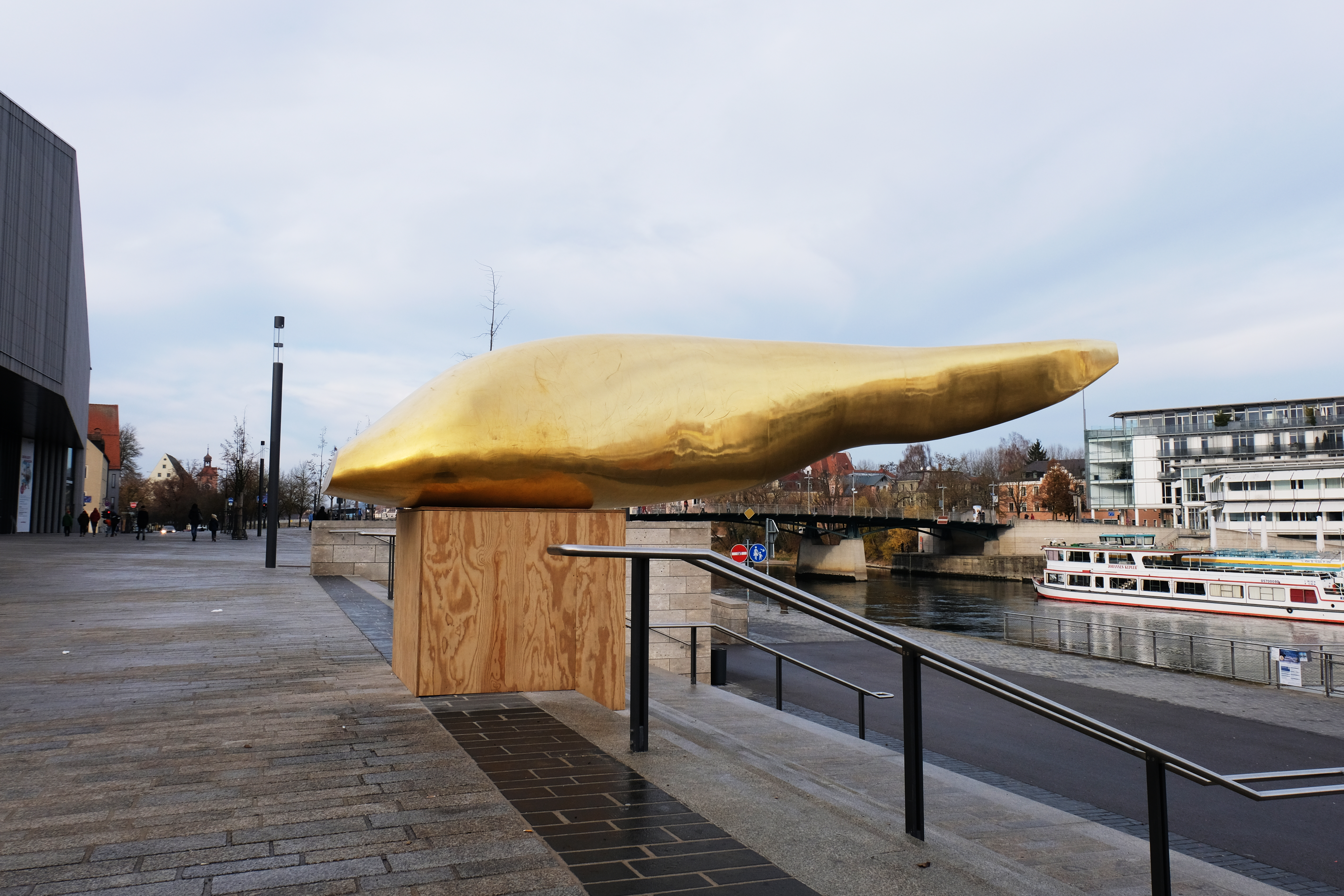 Die Skulptur „Goldener Waller“ von Cisca Bogman und Oliver Störmer vor dem Haus der Bayerischen Geschichte in Regensburg (2019)